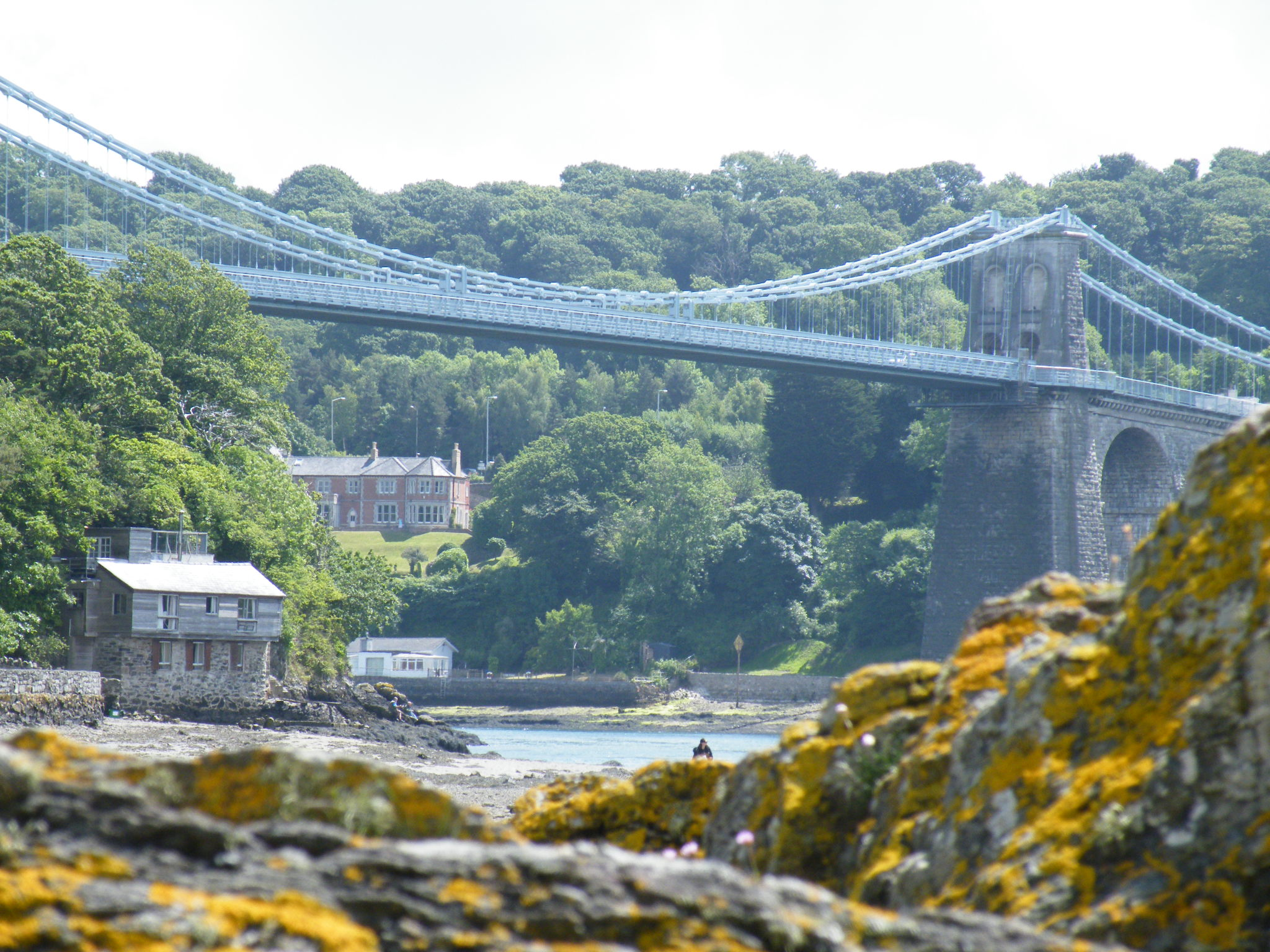 y bont